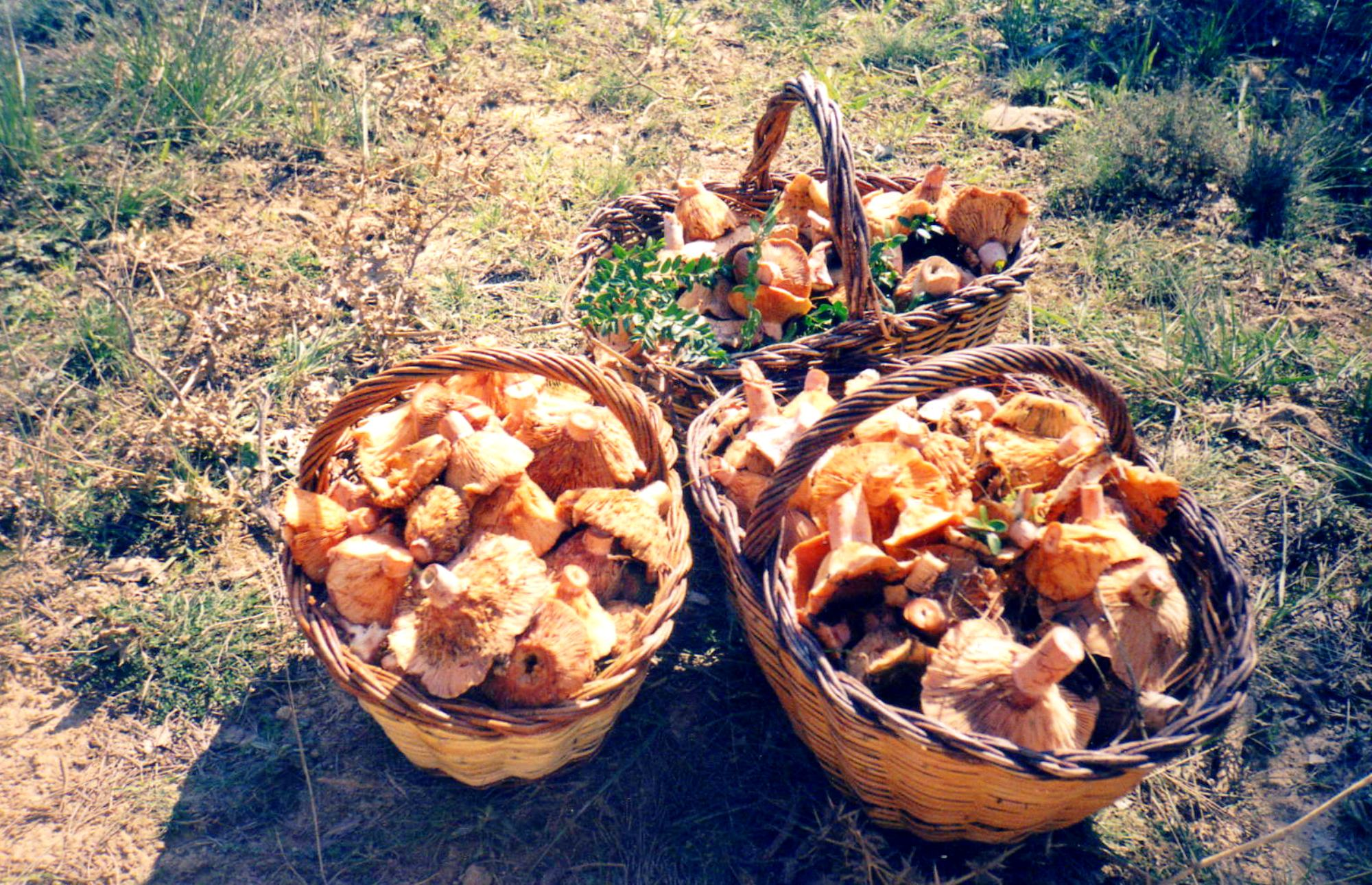 Rovellons